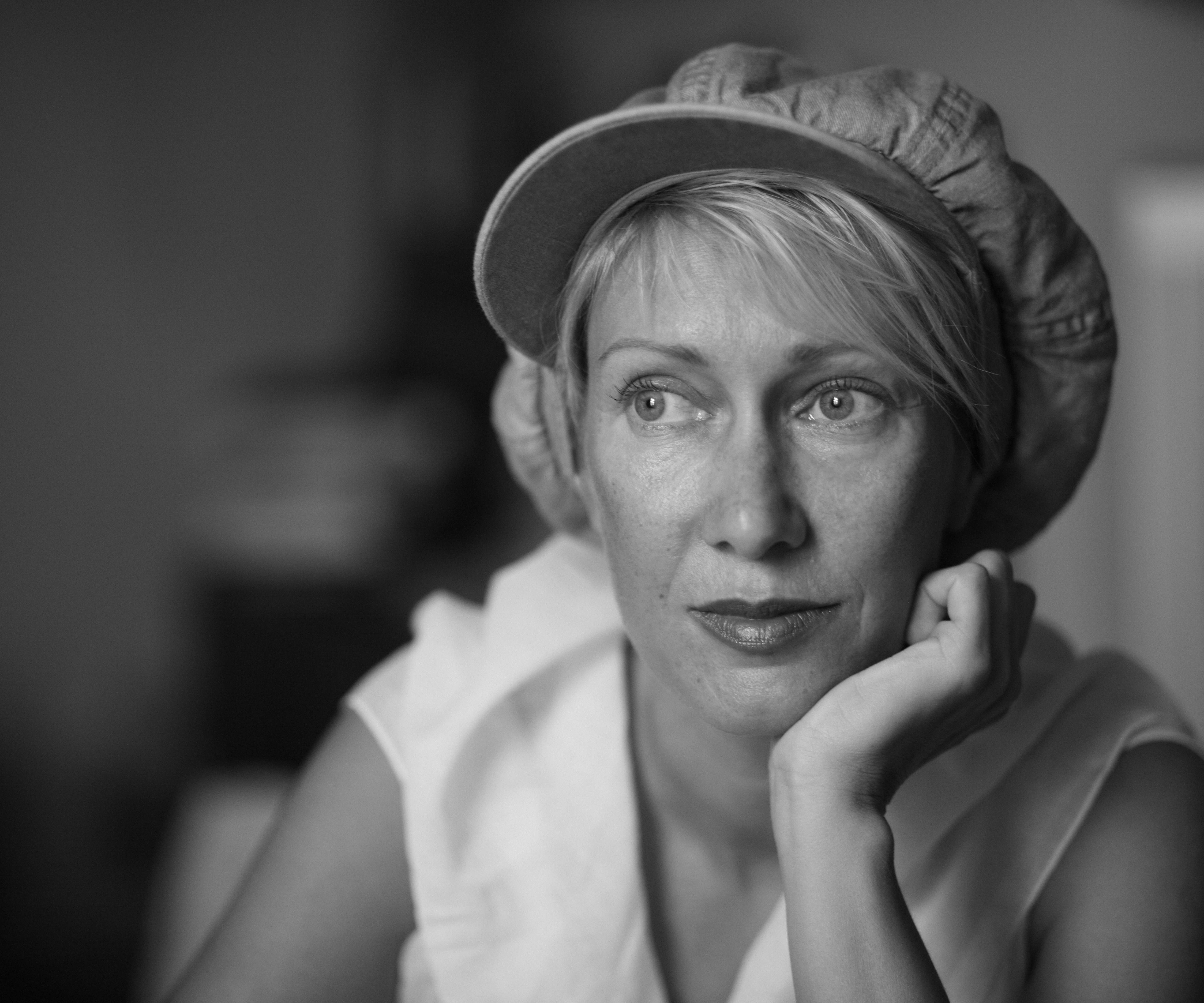 Фотография для телепрограммы